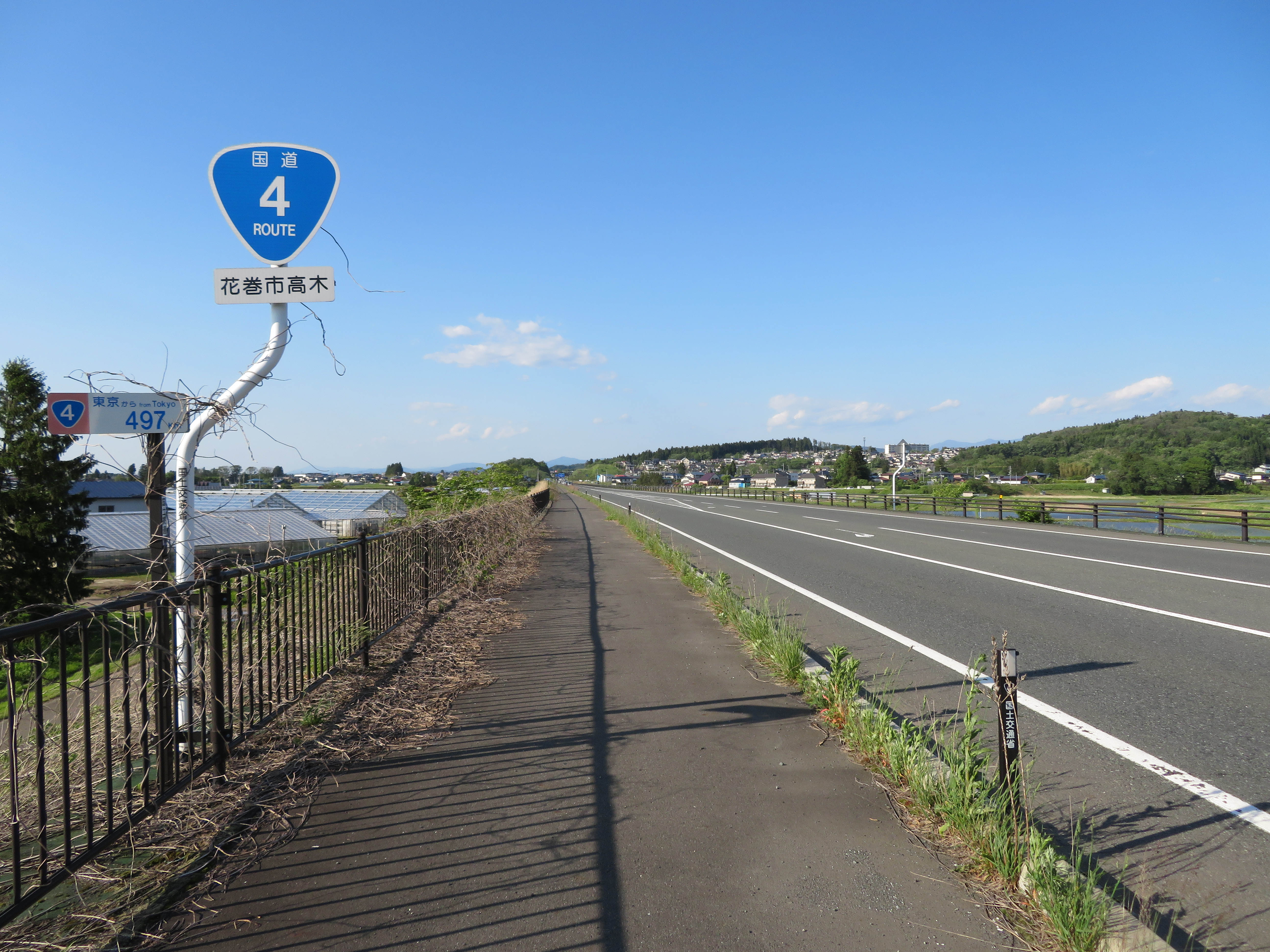 国道4号線 花巻東バイパス岩手県花巻市高木付近（盛岡方面を撮影） Canon PowerShot SX720 HS